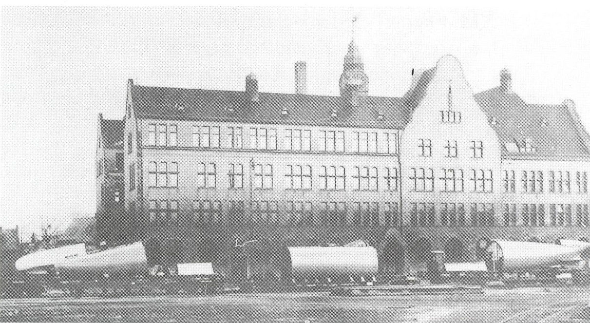 SM UB 13, in mehrere Teile zerlegt und auf Waggons verladen zum Versand nach Amsterdam